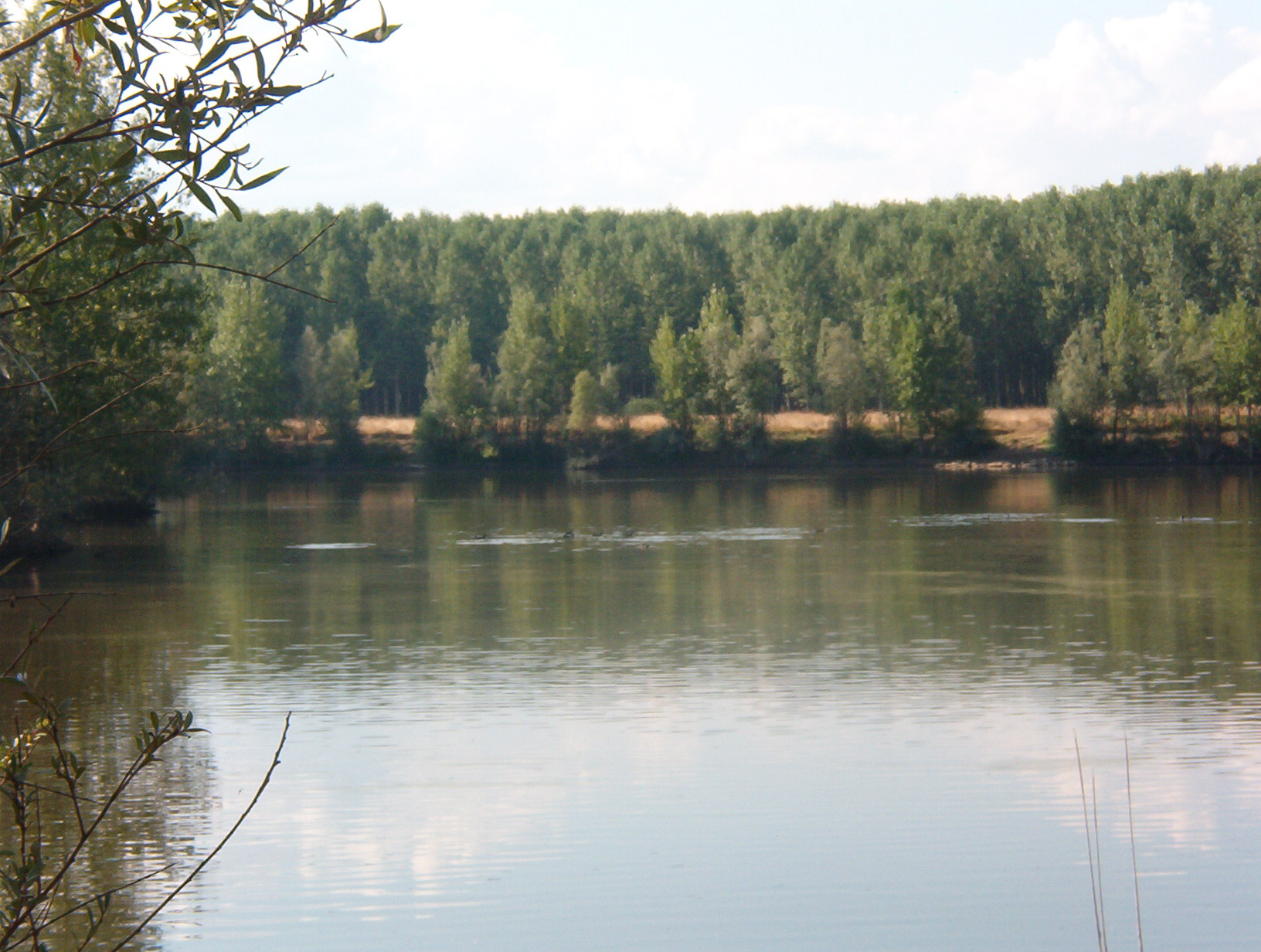 Río Esla